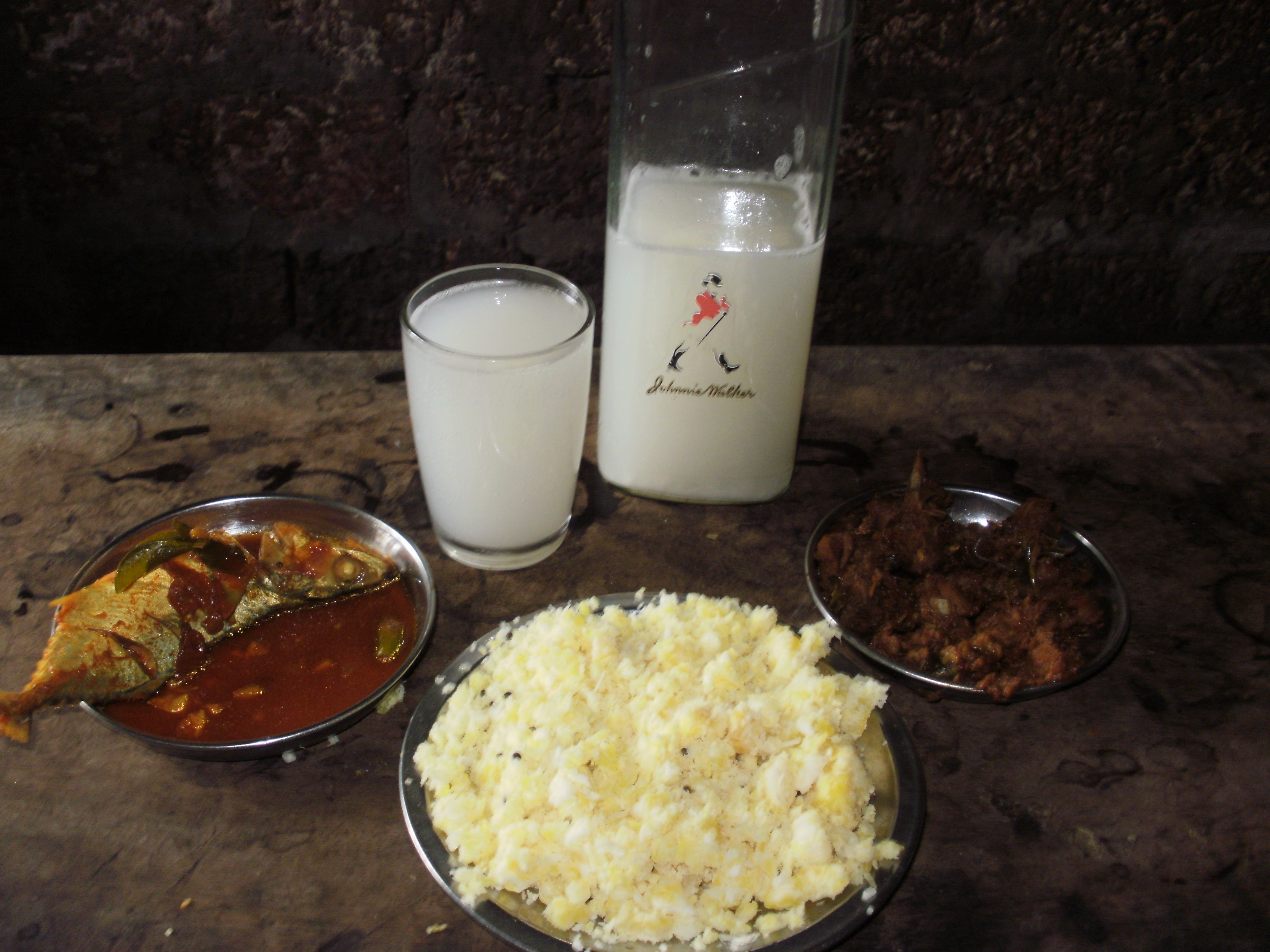 കള്ള്ഷാപ്പ്ഭക്ഷണം